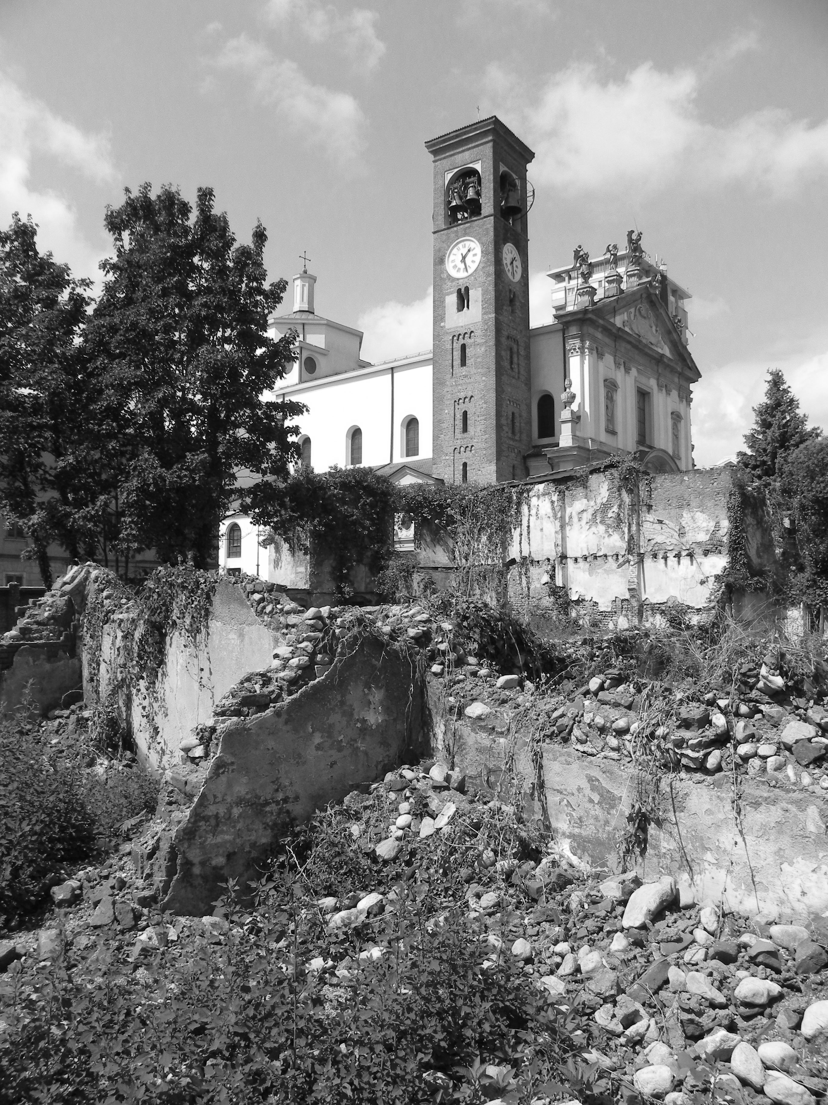 San Michele Arcangelo This is a photo of a monument which is part of cultural heritage of Italy.